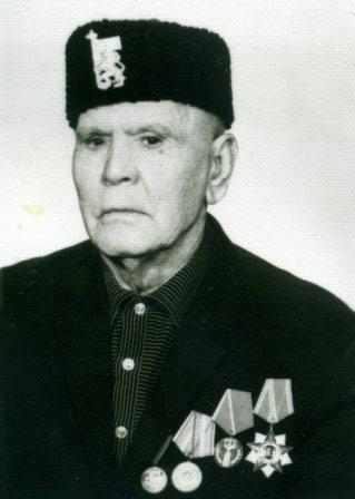 Снимка на Костадин Титянов